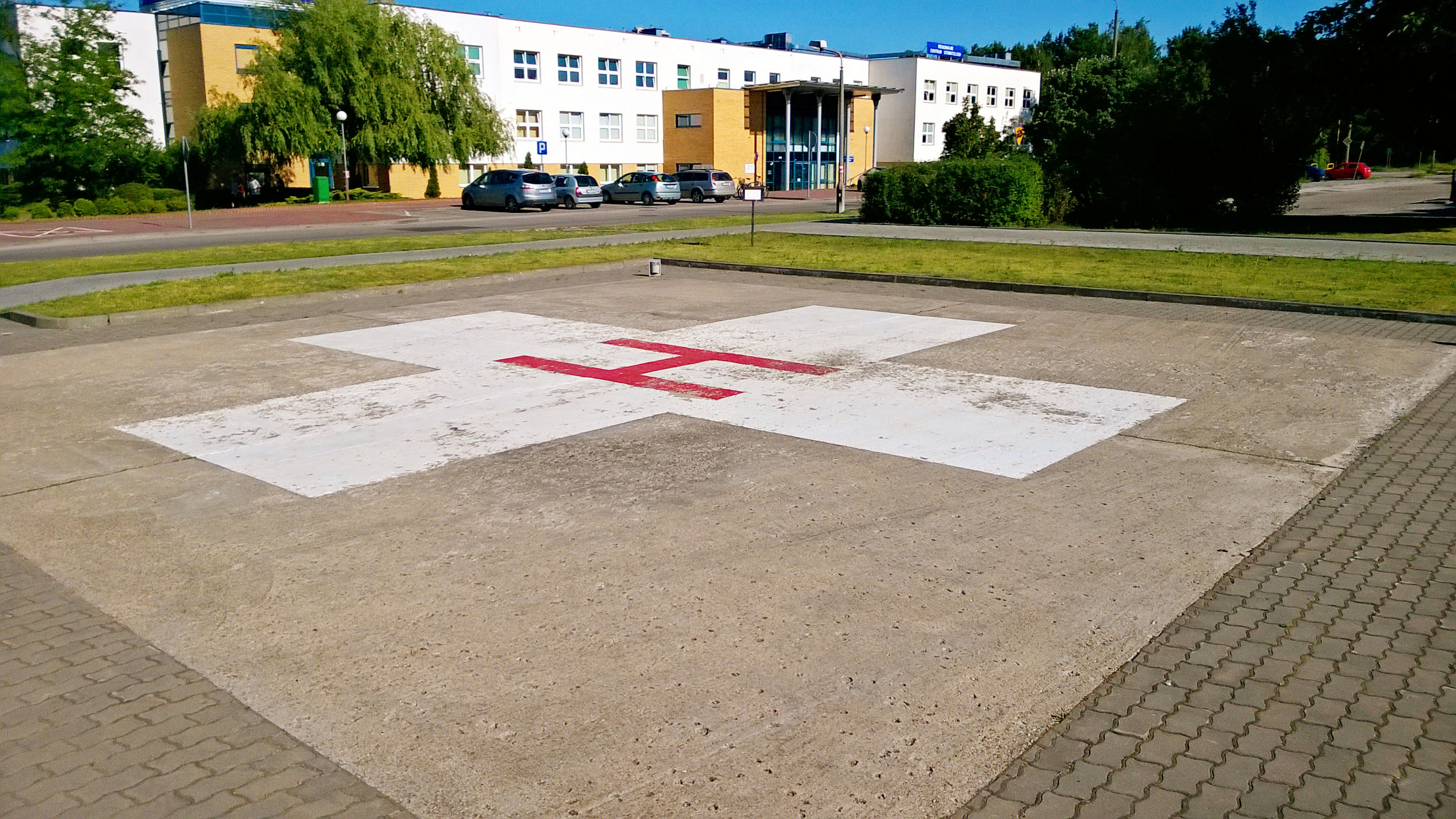 Lądowisko przy Wojewódzkim Szpitalu Dziecięcym w Toruniu